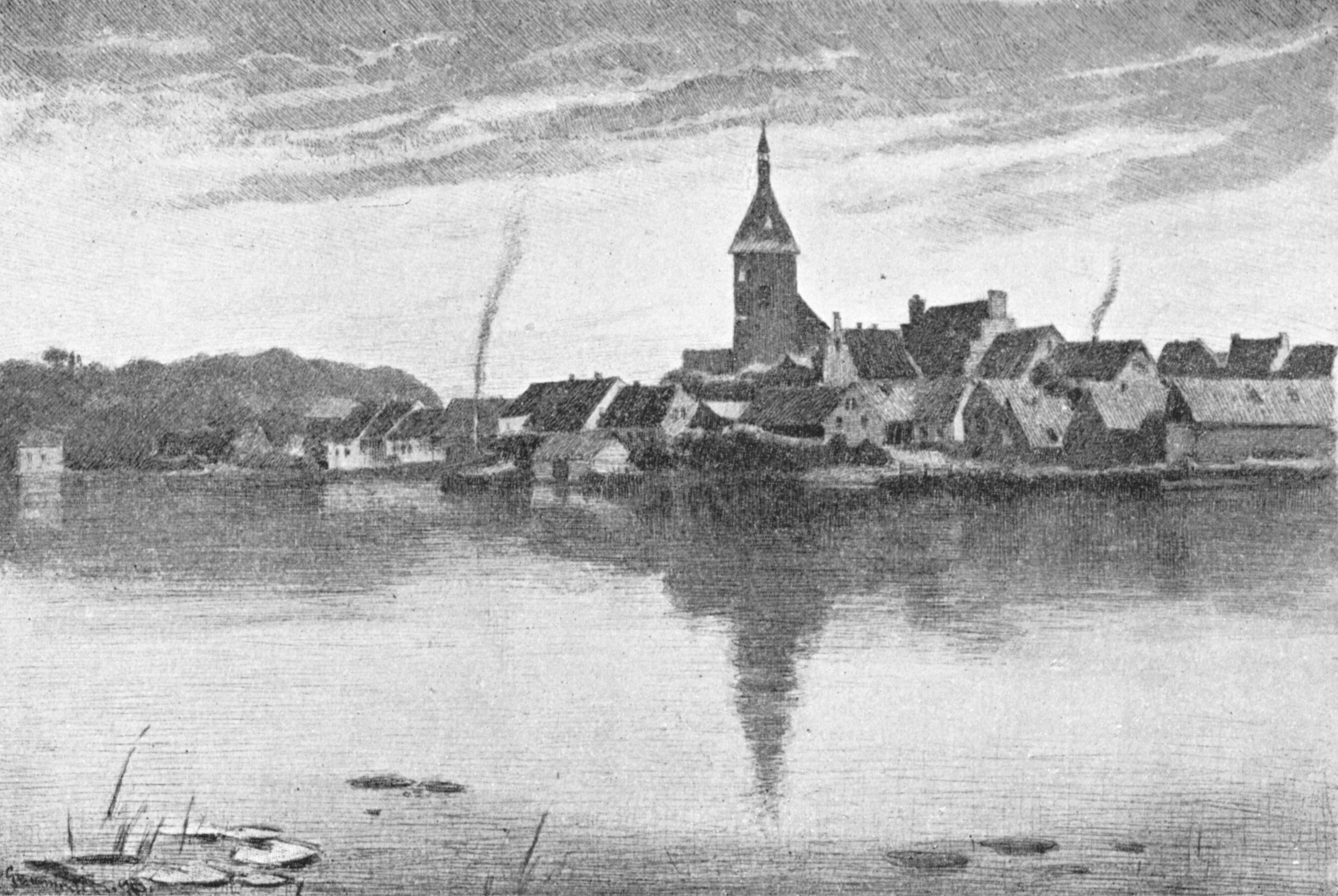 Mölln um 1895, gezeichnet von Georg Burmester